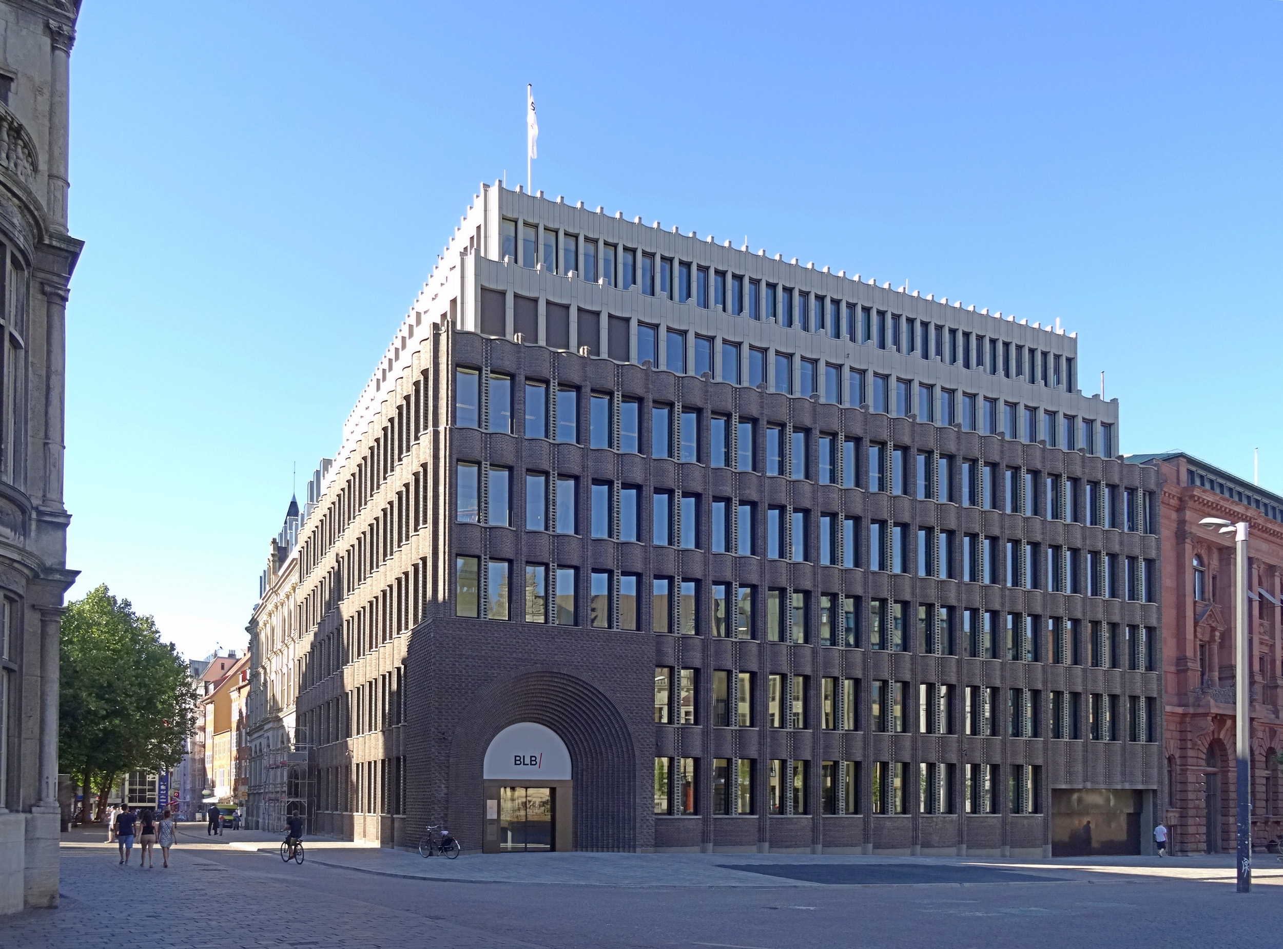 Bremer Landesbank, Domshof 26. Neubau 2016